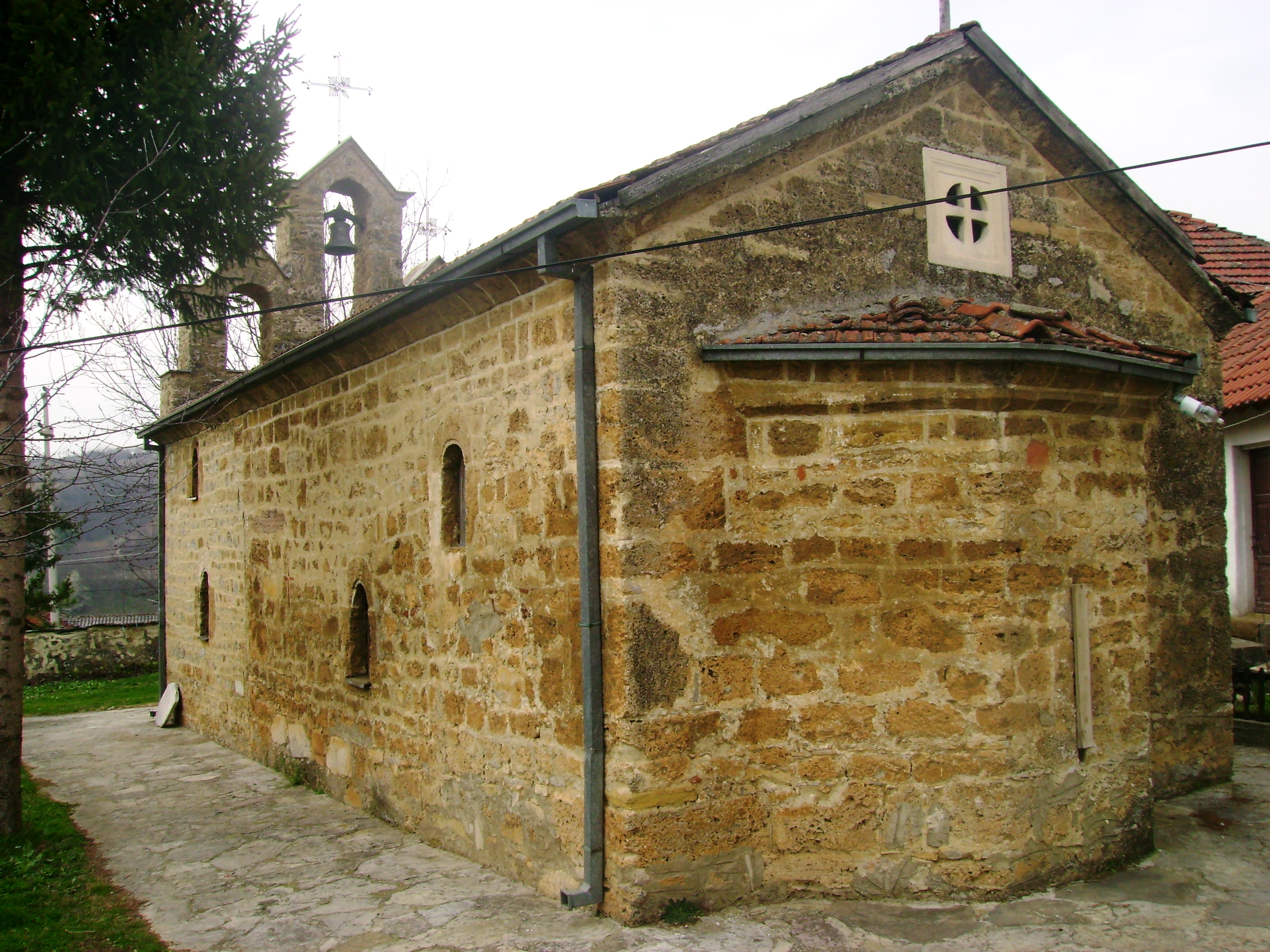 Srpskohrvatski / српскохрватски: Косово и Метохија